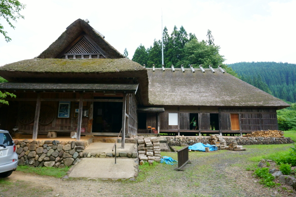 鈴木家住宅（秋田県羽後町）。江戸時代中期の築造で、国の重要文化財に指定されている。鈴木家は源平合戦の時代の鈴木三郎重家に由来する家系で、東北地方の鈴木姓の祖にあたる。